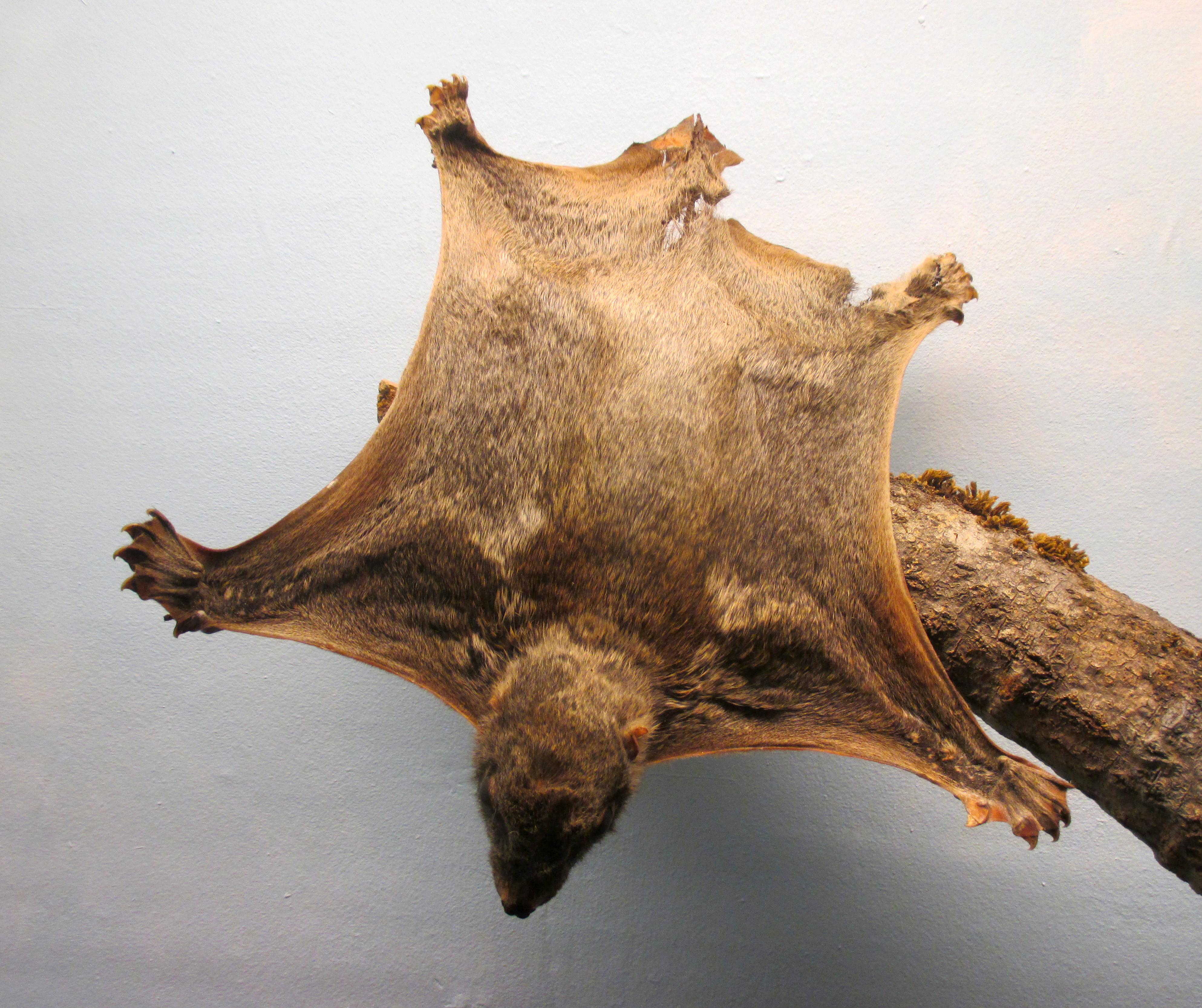 Uppstoppad ung hona av malajisk pälsfladdrare (Galeopterus variegatus) från Java på Göteborgs Naturhistoriska Museum, Göteborg, Sverige.